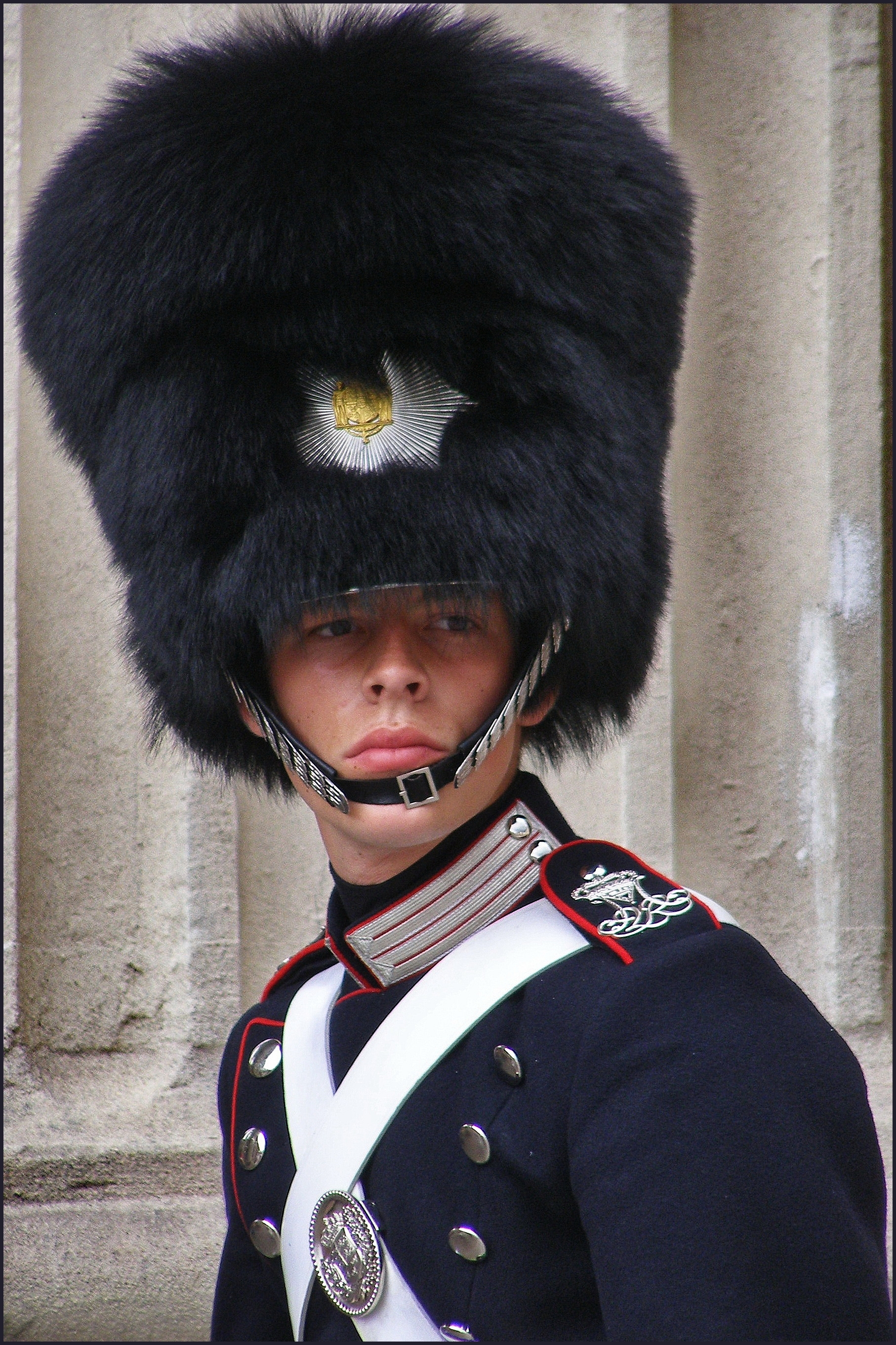 giovane guardia al palazzo della regina di Danimarca